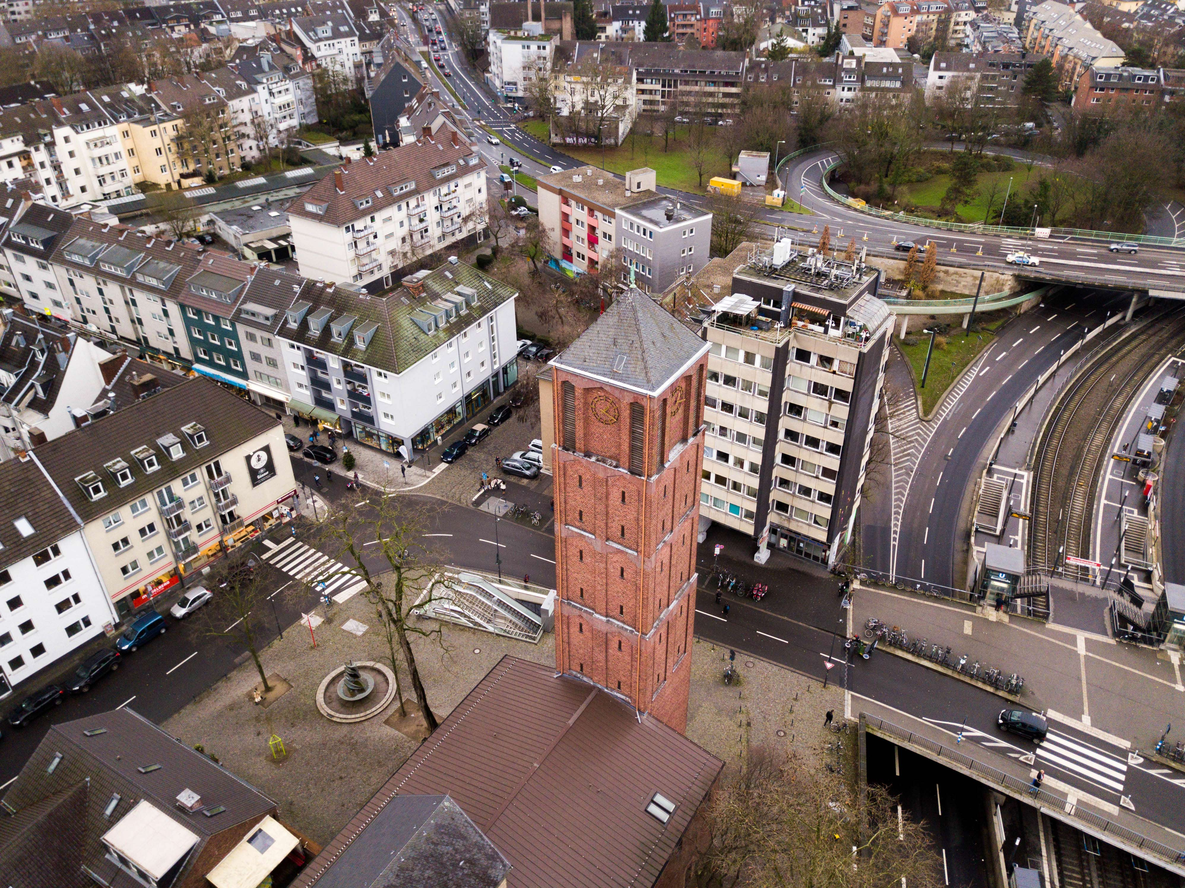 Die katholische Kirche St. Johann Baptist in der Kölner Südstadt von schräg oben.